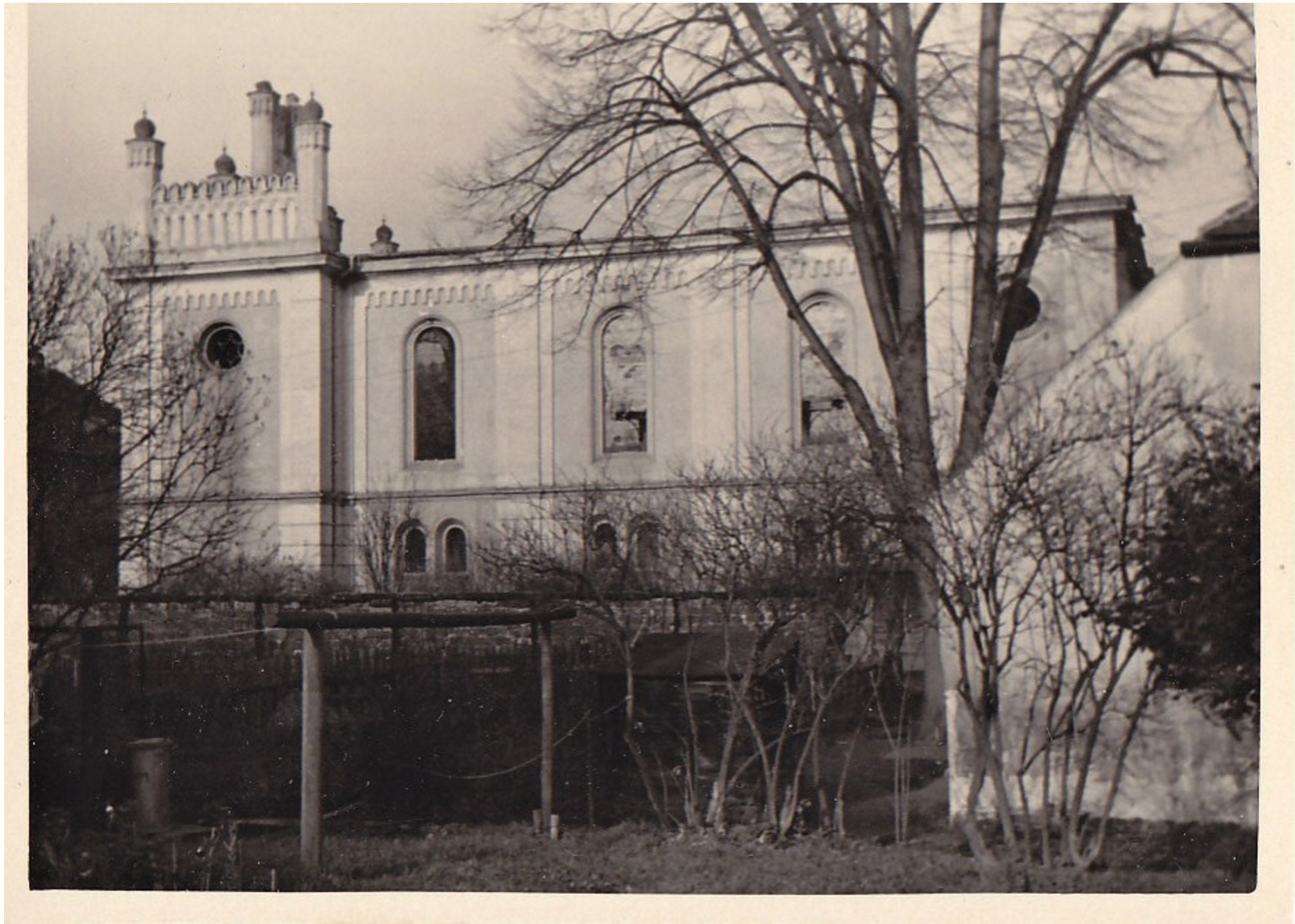 Synagoga v České Lípě, fotopohlednice kolem roku 1920.